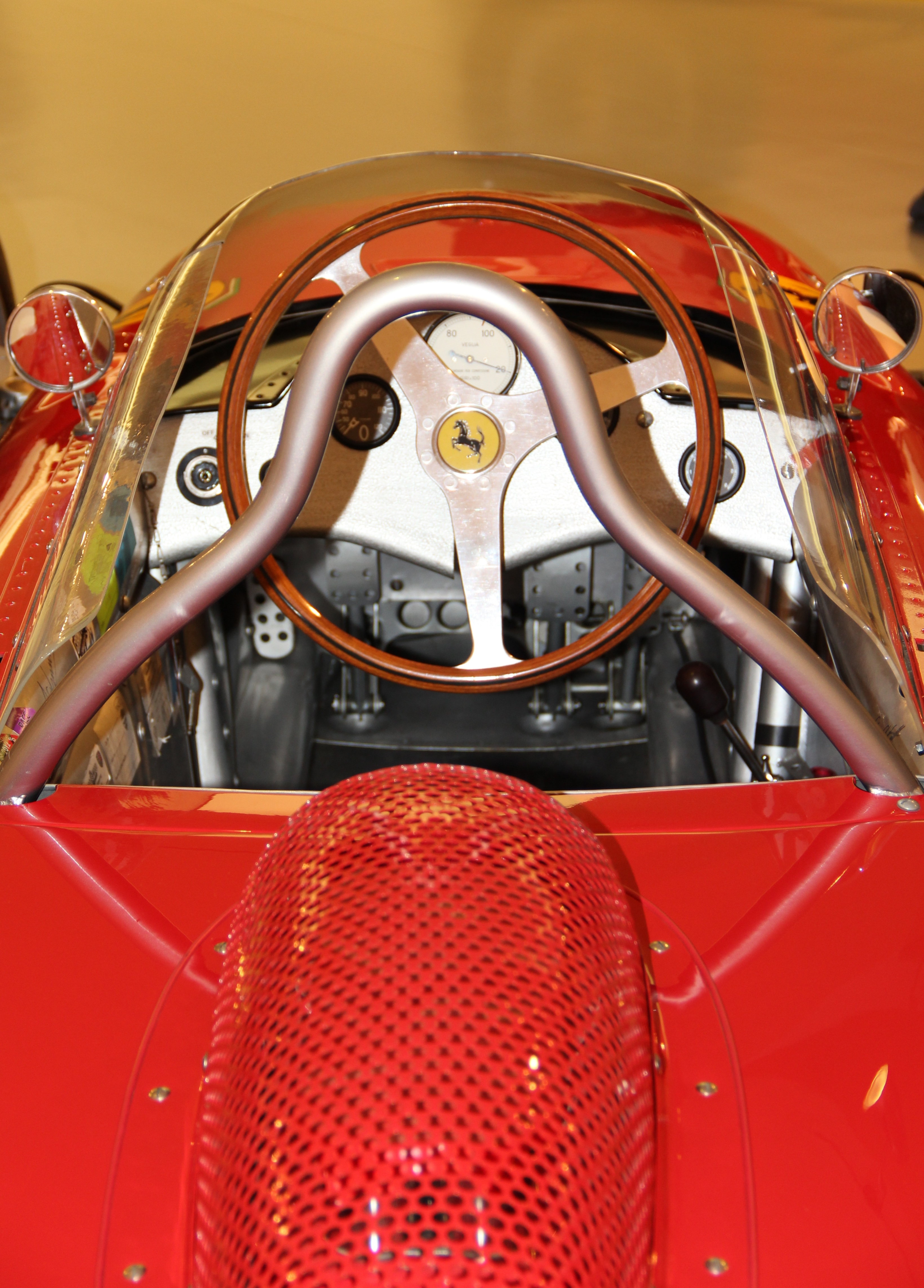 Ferrari-Museum Maranello